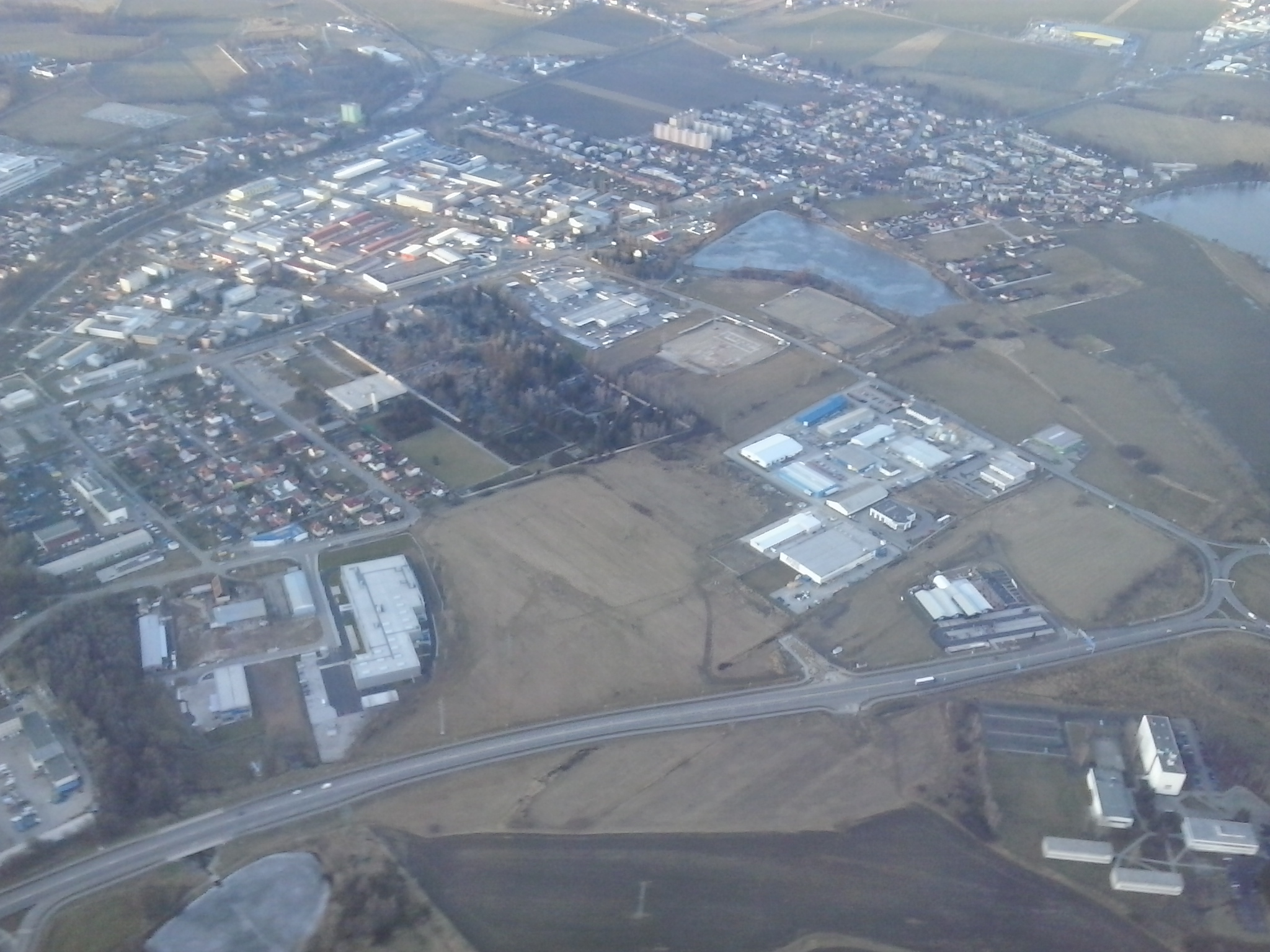 Nemanice s Kněžskými Dvory v pozadí.